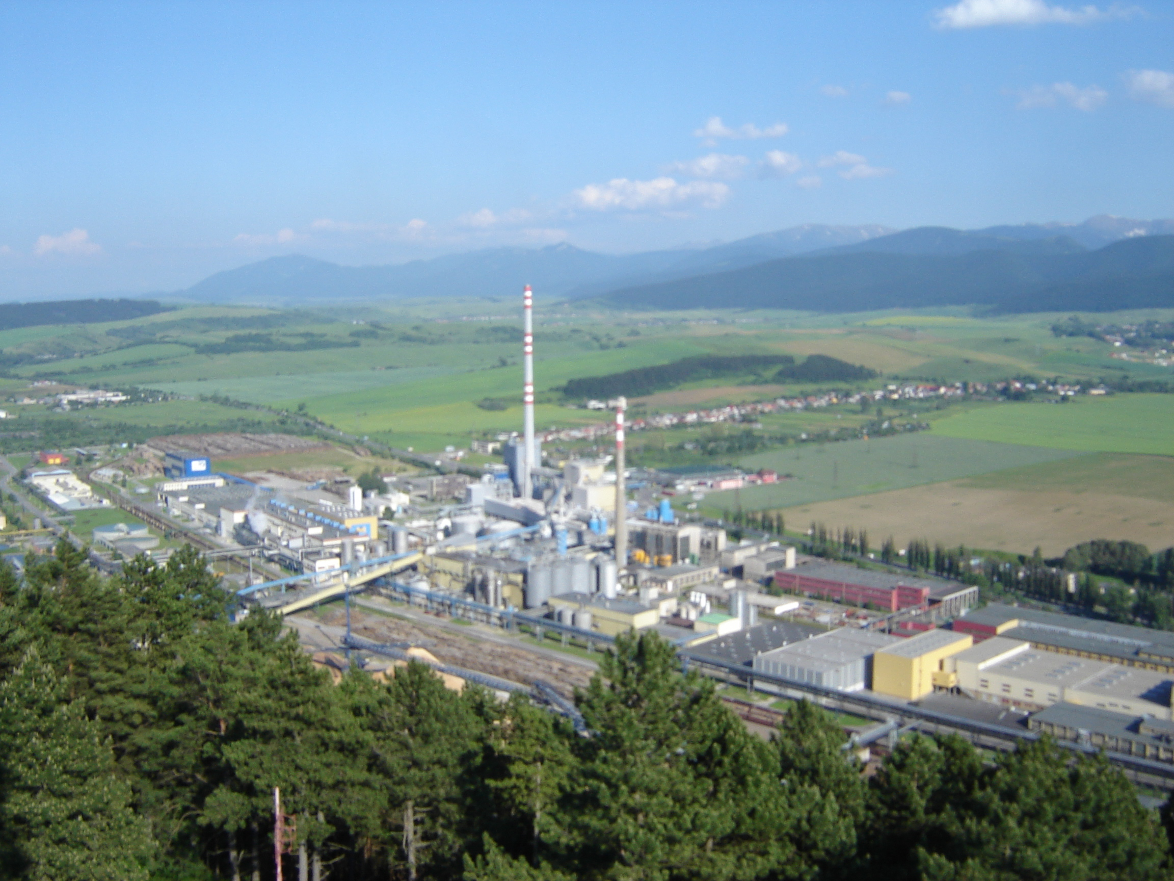 Mondi Business Paper SCP